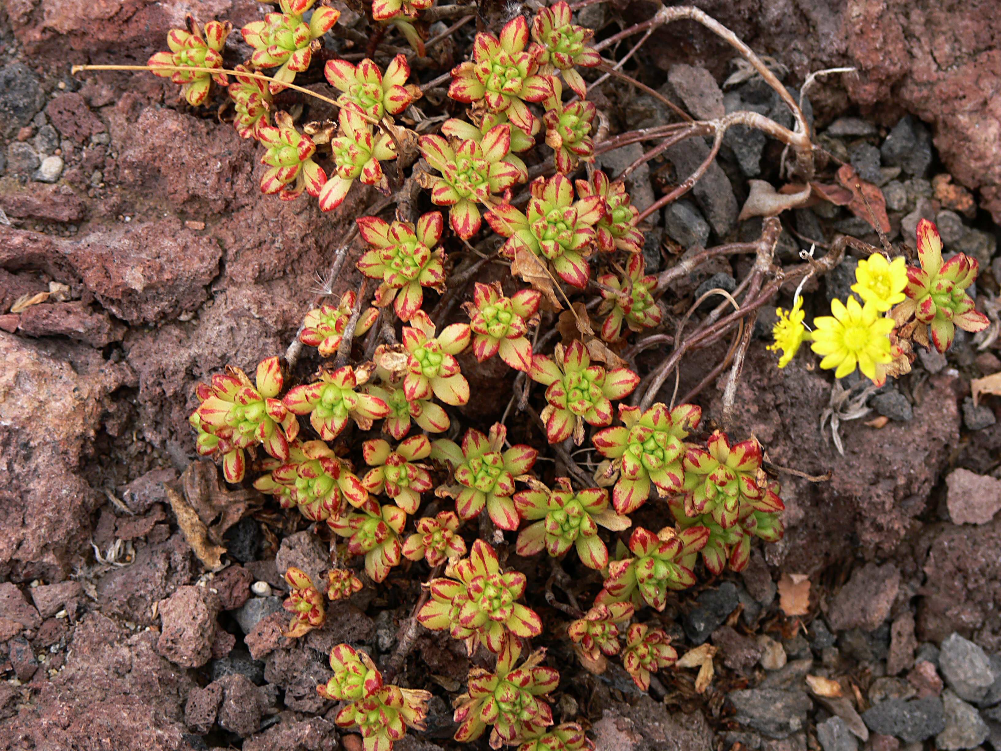 Aeonium sedifolium (WEBB) PIT.et PROUST, Botanischer Garten Krefeld